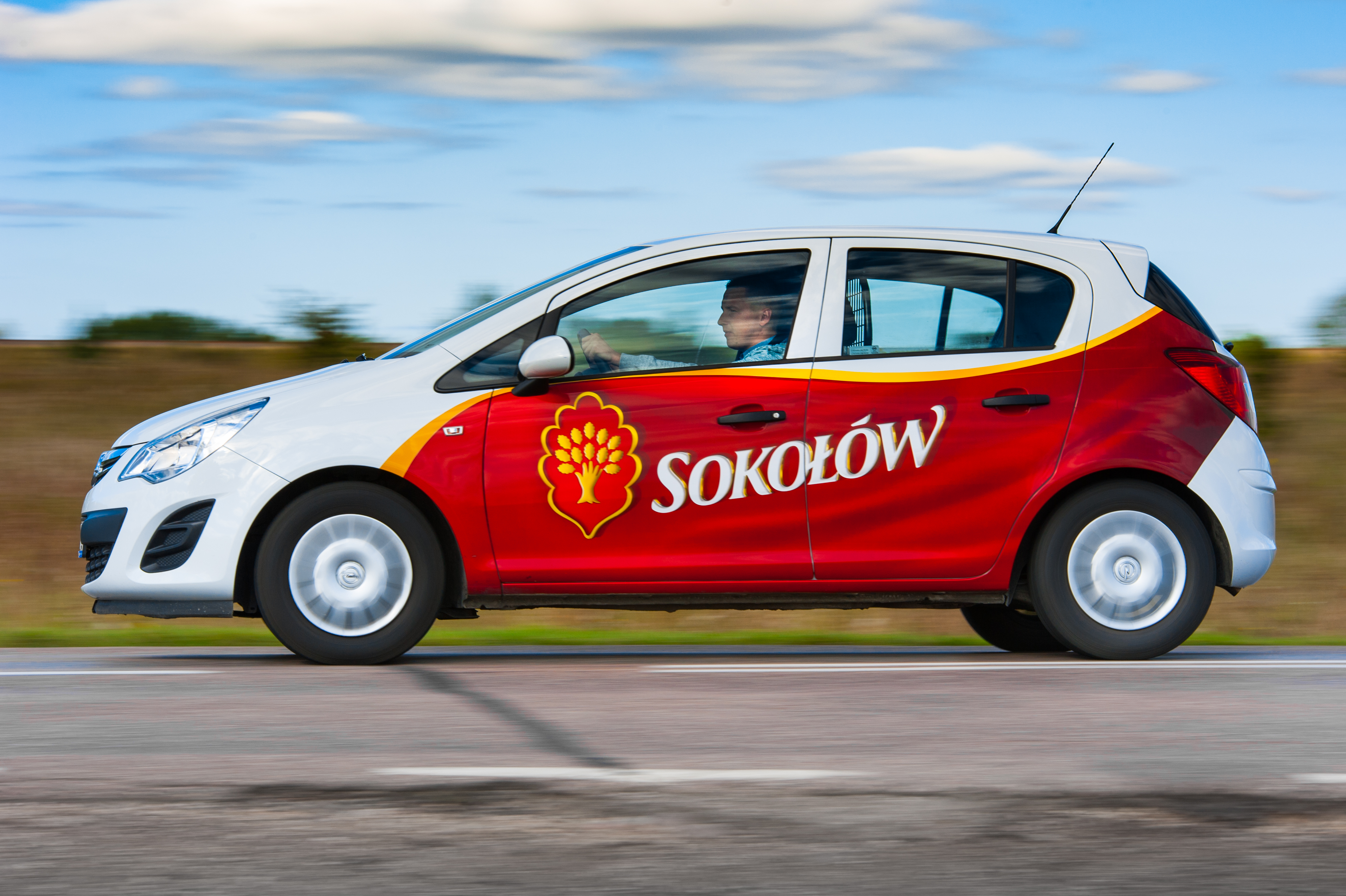 Sokołów SA - dystrybutor handlowy